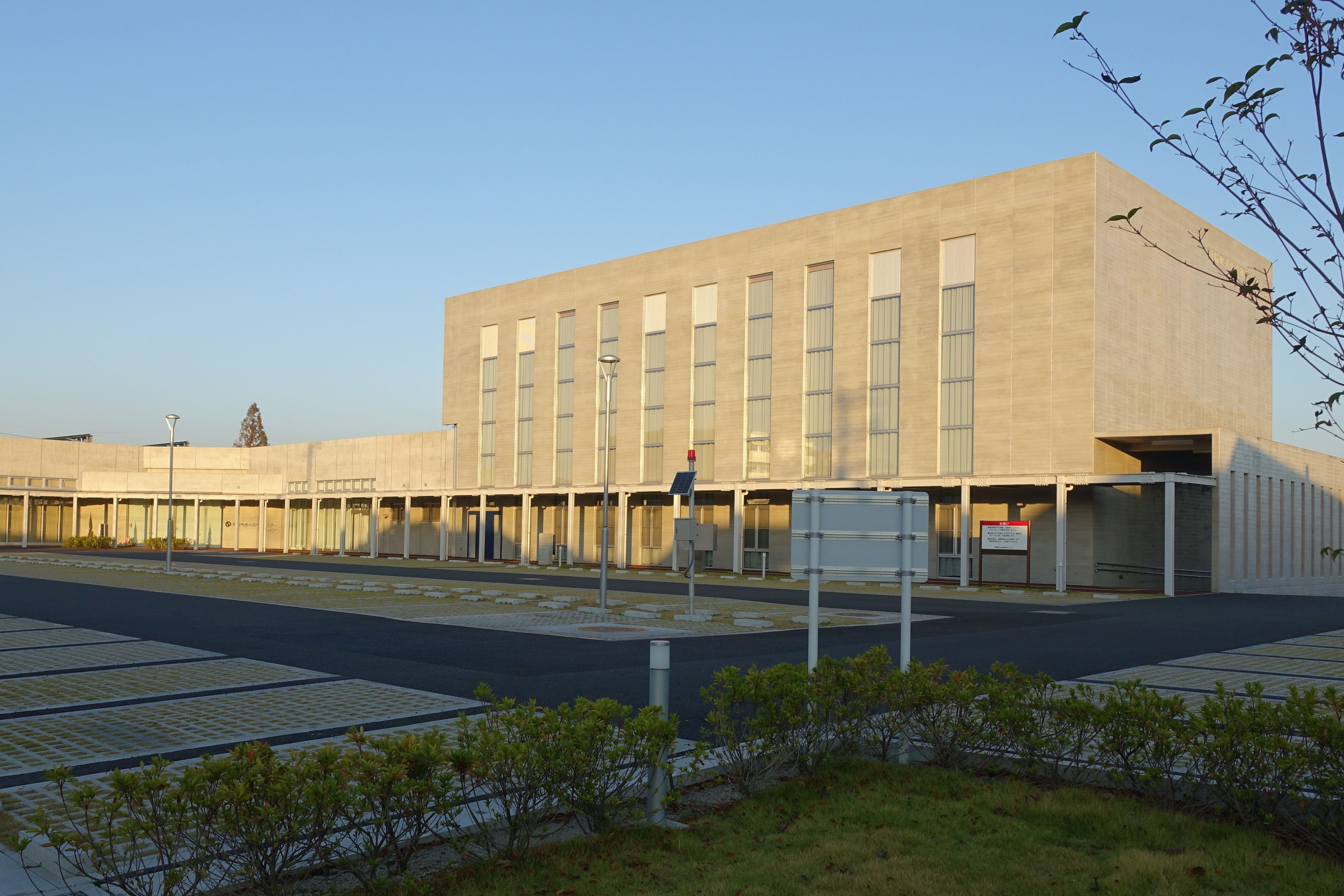 光の森町民センターを南東側から